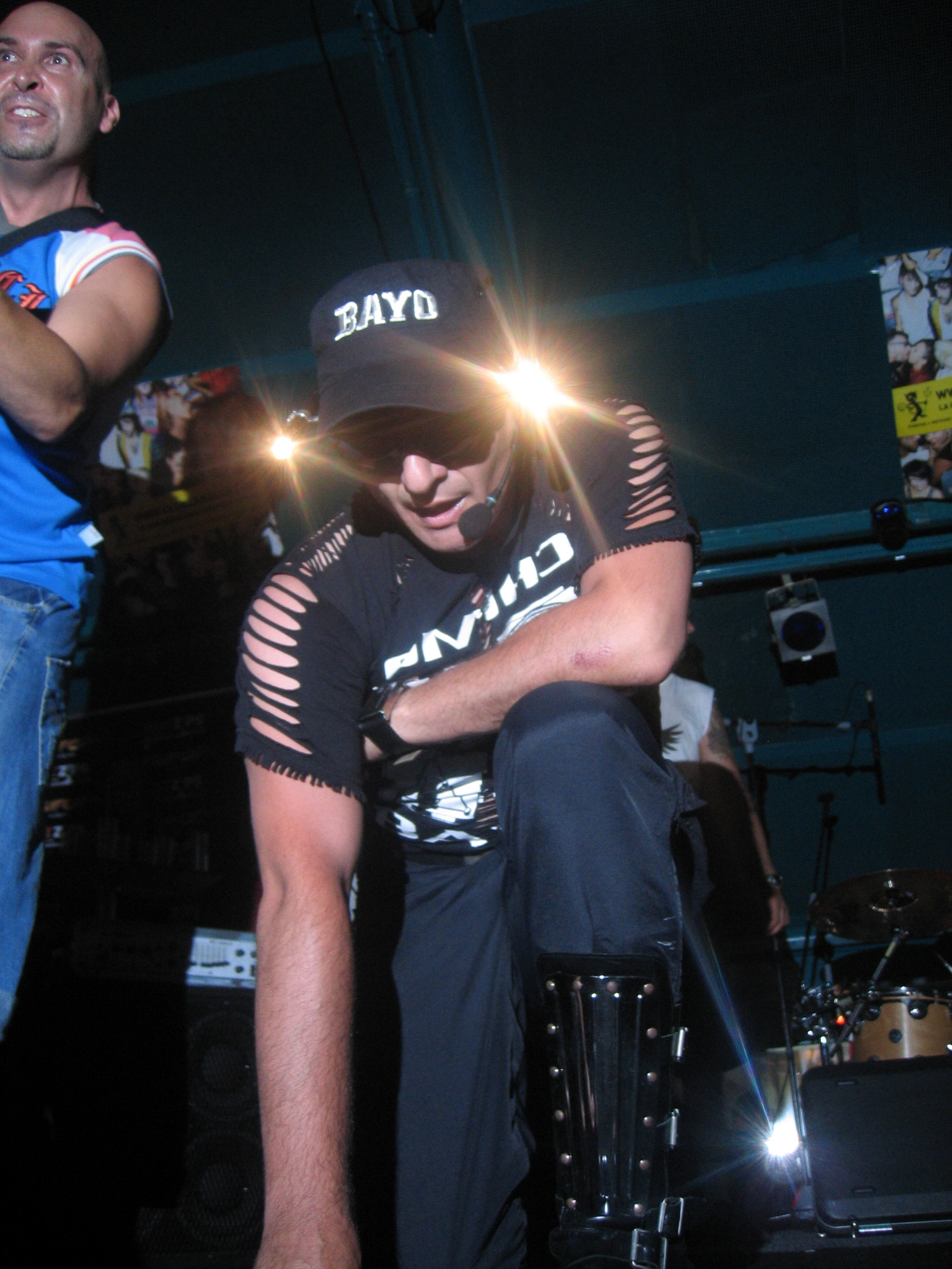 Chimo Bayo